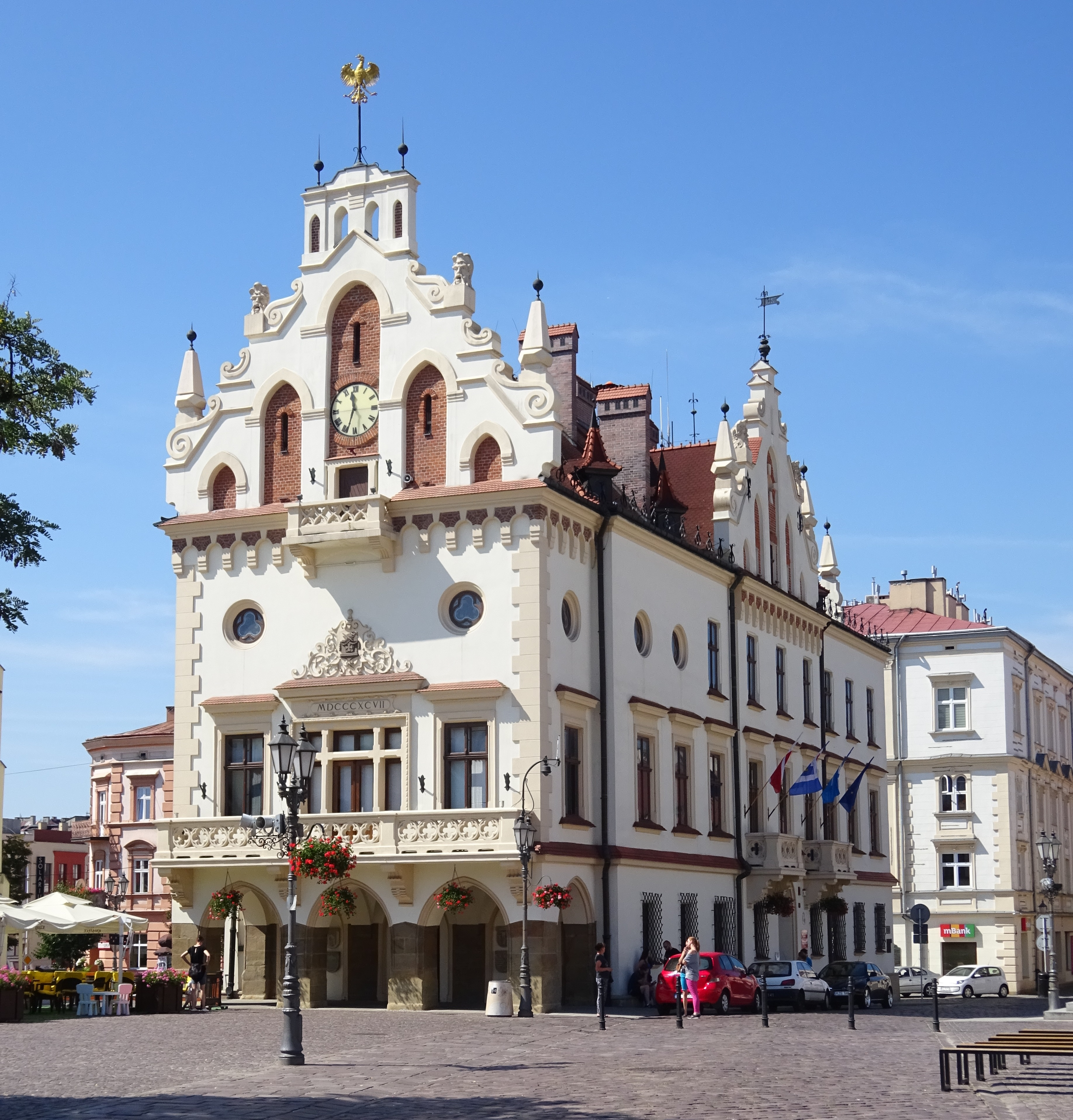 Ratusz na Rynku w Rzeszowie.